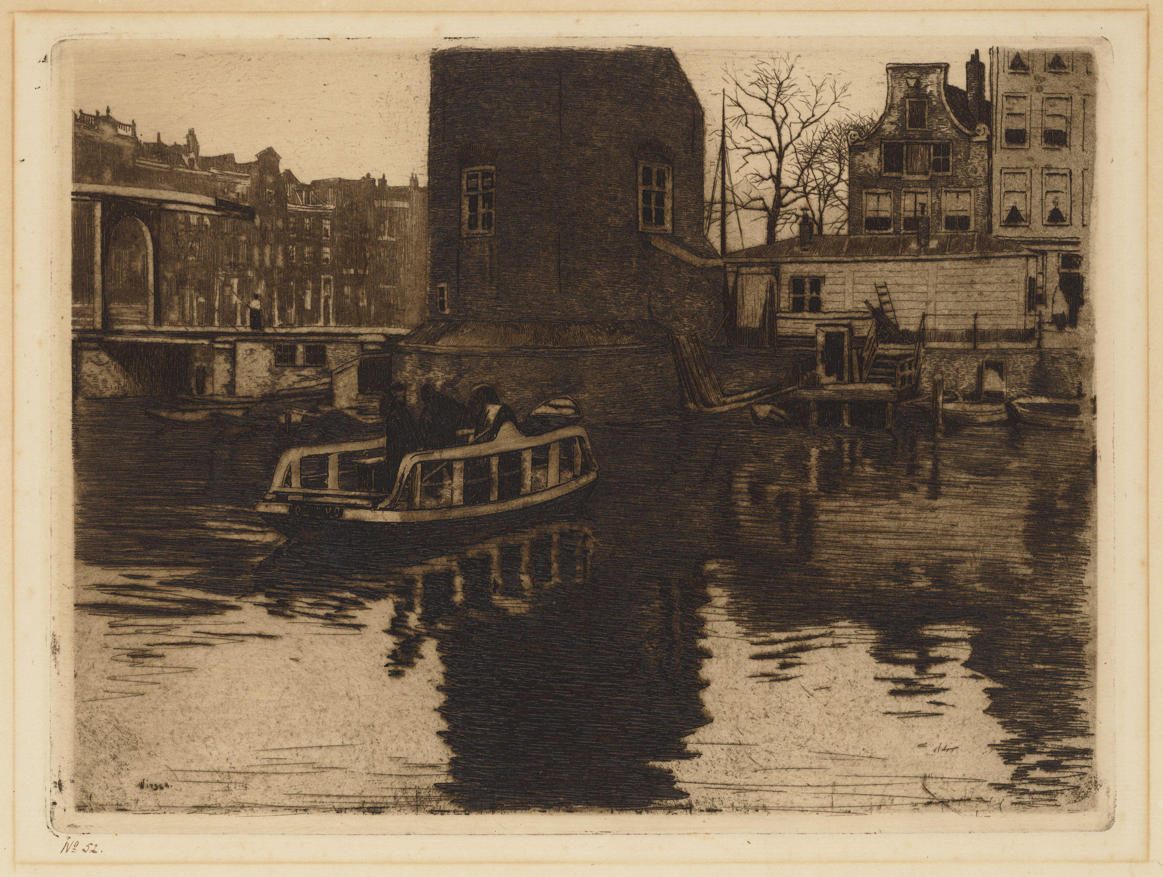 Beschrijving De voet van de Montelbaanstoren, Oude Schans 2, met overhaal en enkele passagiers Links Oudeschans 4 en 6, rechts Brug 290 over de Waalseilandsgracht en huizen aan de Binnenkant. De originele voorstelling in spiegelbeeld. Datering voorstelling: 1897. Techniek: aquatint. Documenttype prent Vervaardiger Witsen, Willem (1860-1923) Collectie Collectie Stadsarchief Amsterdam: tekeningen en prenten Datering 1897 t/m 1903 Geografische naam Oudeschans Binnenkant Inventarissen Afbeeldingsbestand 010097010825